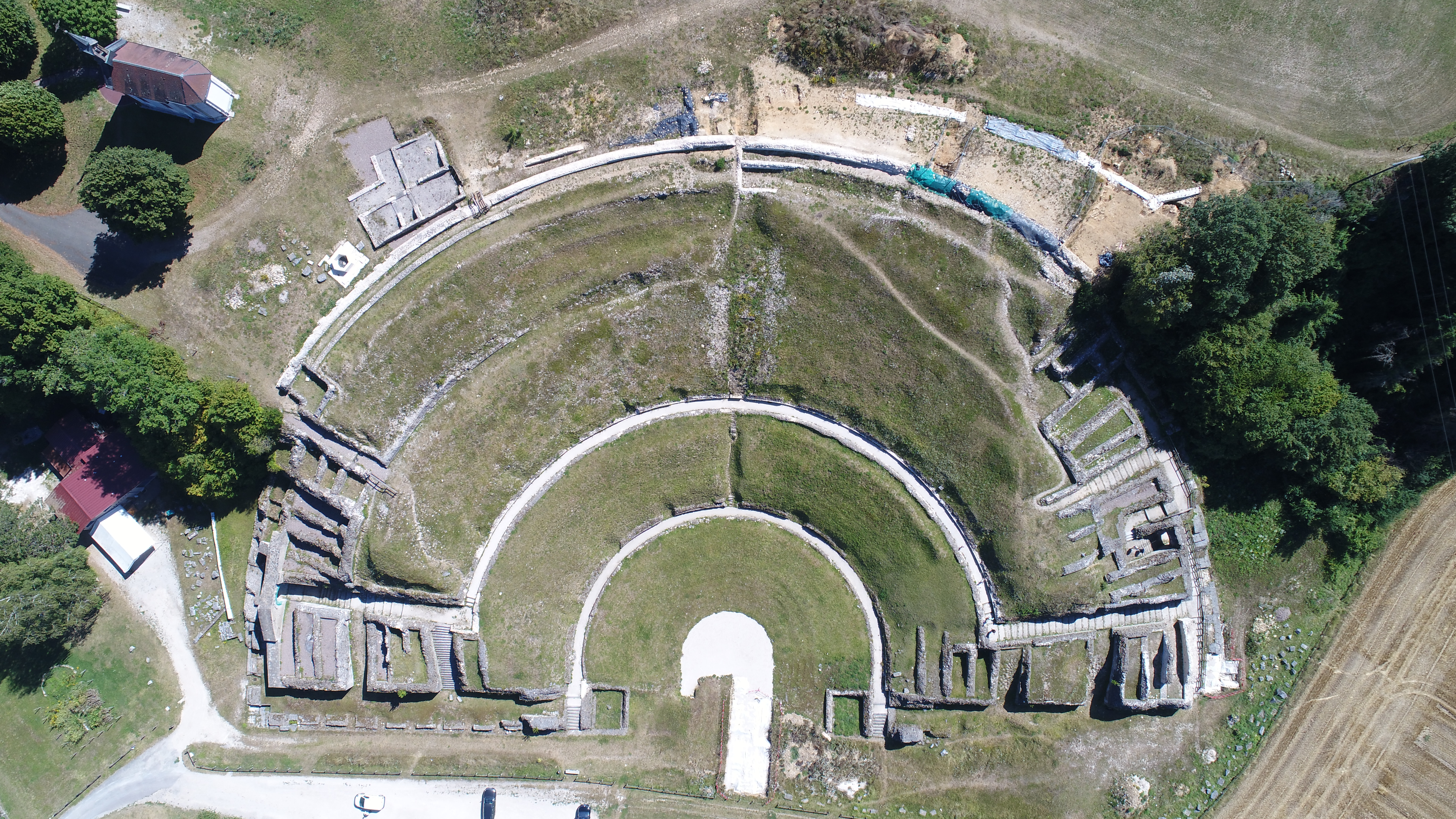 Vue aérienne du théâtre gallo-romain de Mandeure (25).